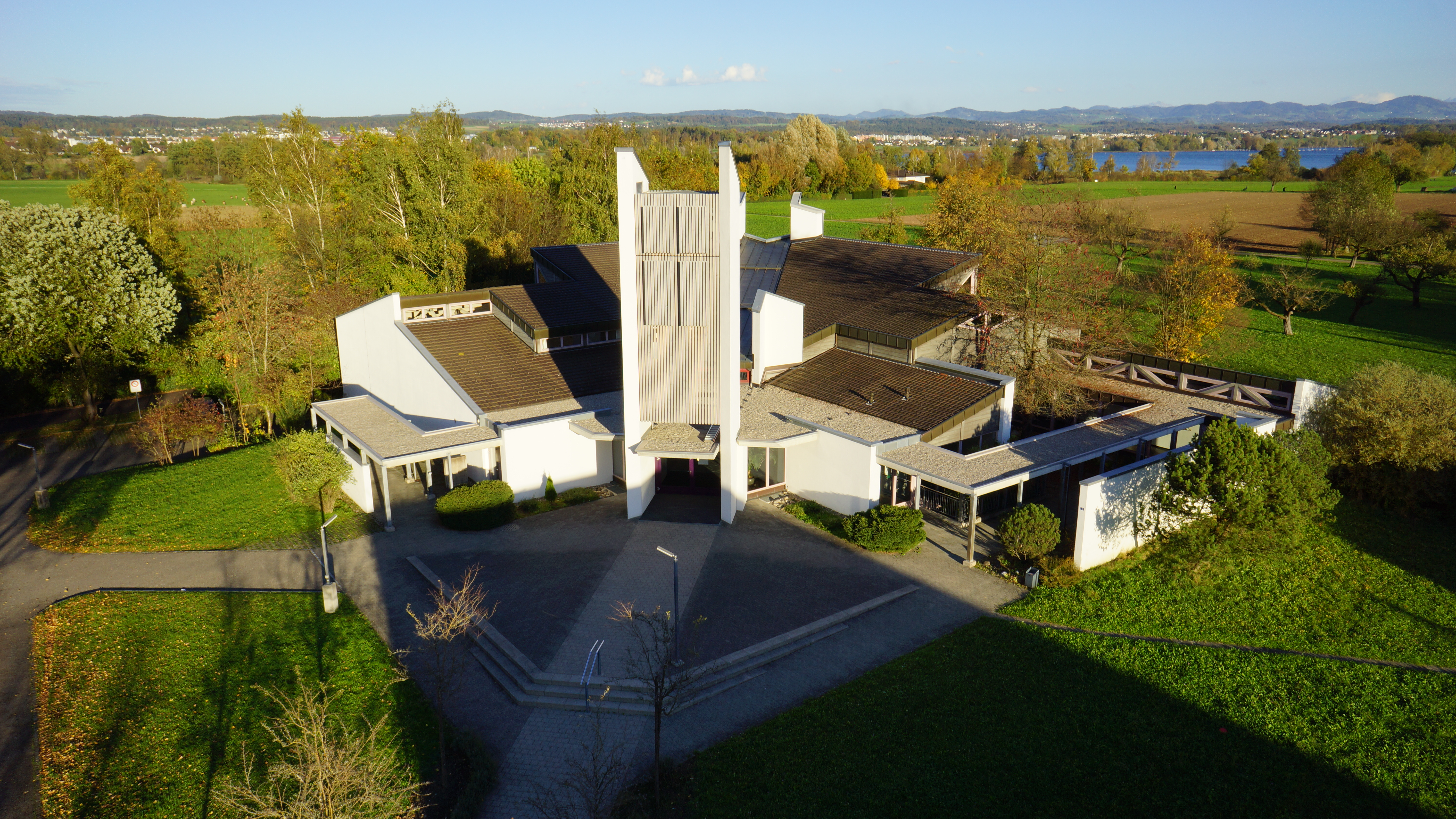 Römisch-katholische Kirche St. Katharina von Siena Fällanden, Ansicht von Süden